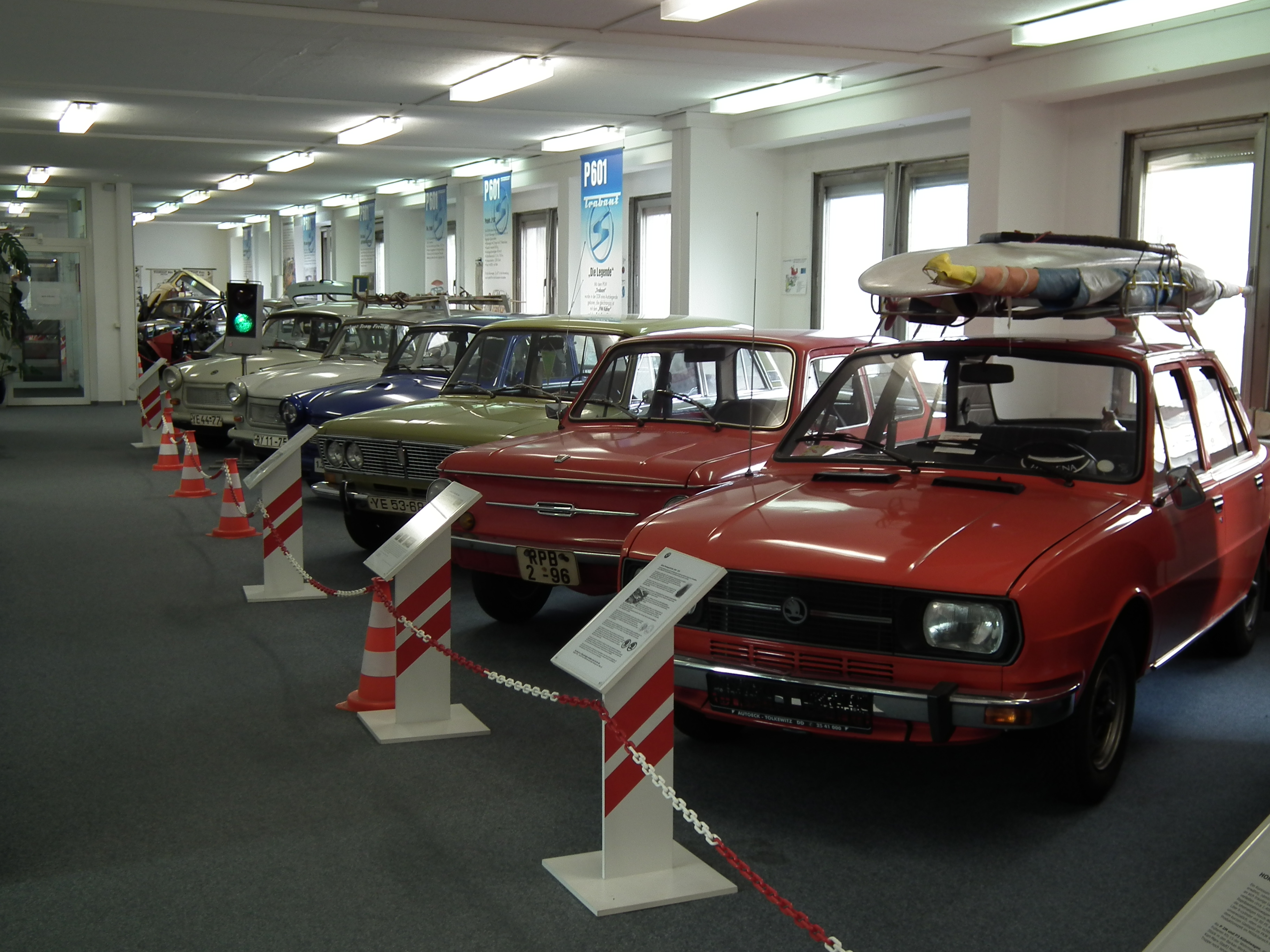 DDR-Museum Zeitreise in Radebeul, Autotypen (Skoda, Dacia, Wartburg und natürlich Trabant), die in der DDR häufig anzutreffen waren